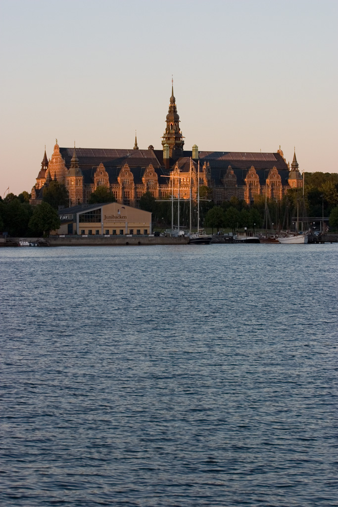 Nordiska museet sett från Blasieholmen